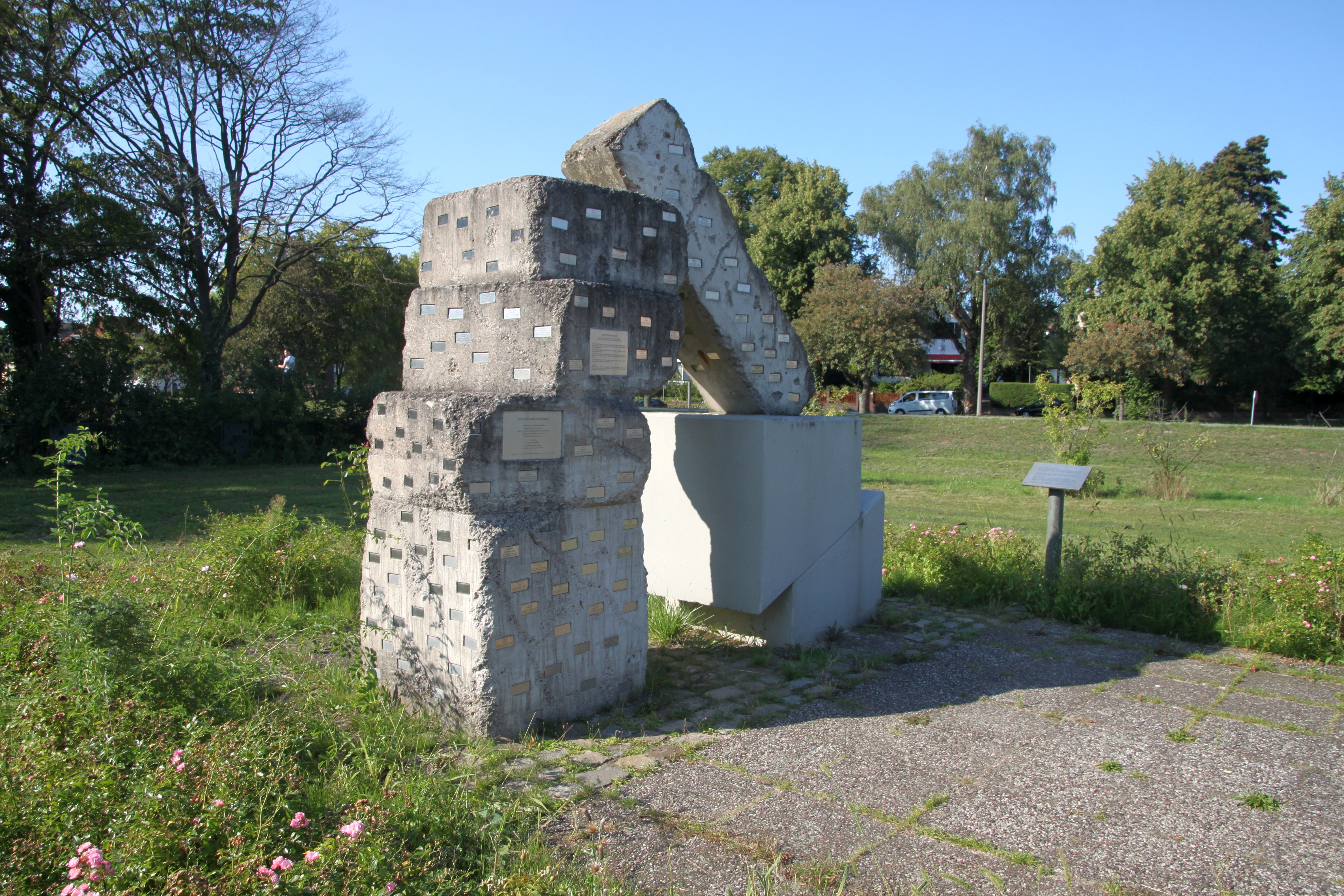 Bremen-Blumenthal, Bahrsplate, Stein der Hoffnung, Mahnmal_Gedenkanlage_Anlage zum Gedenken an die Toten der Lager während des 2. WK in Blumenthal